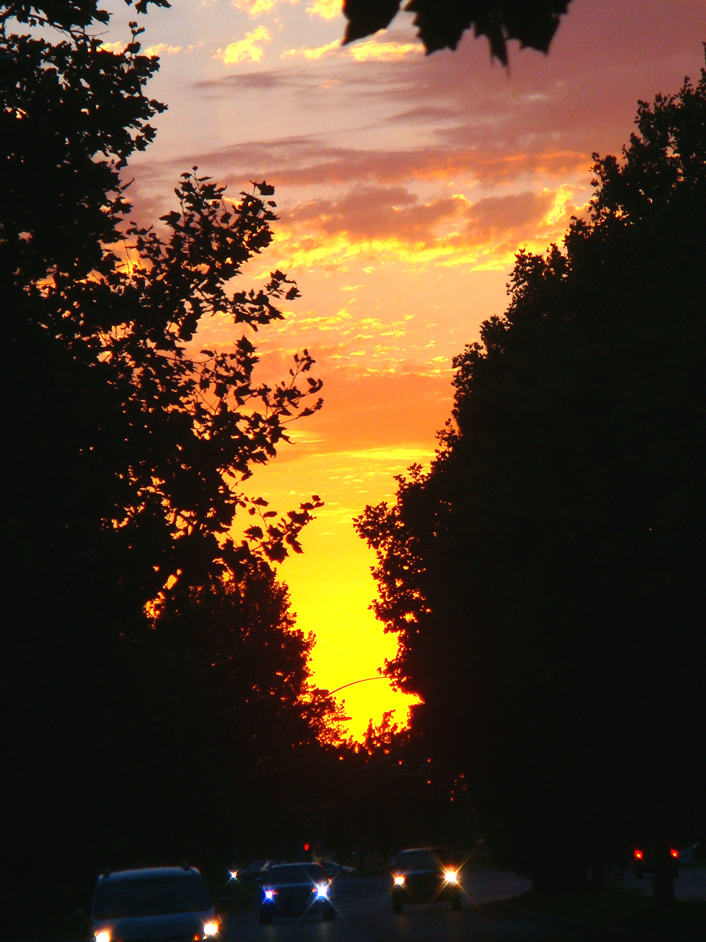 Sunset on Laguna blvd